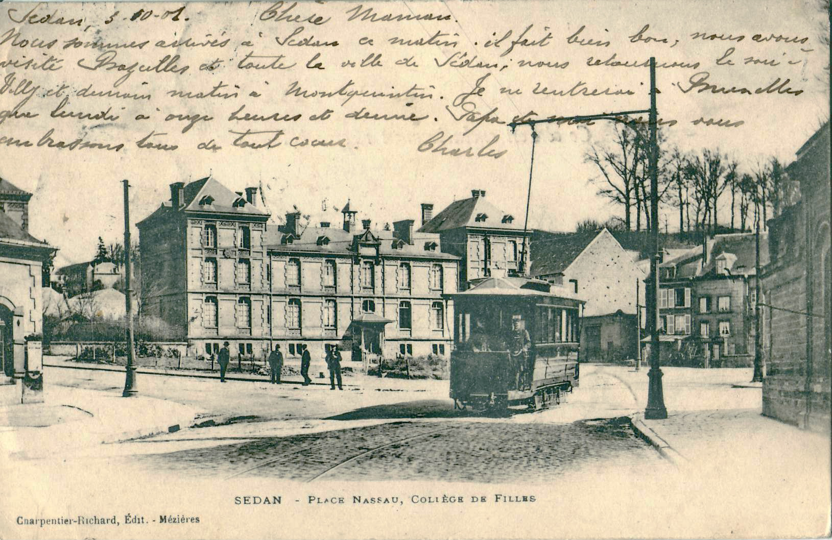 Carte postale ancienne éditée par Charpentier-Richard, éditeur à Mézières : SEDAN - Place Nassau, collège de filles